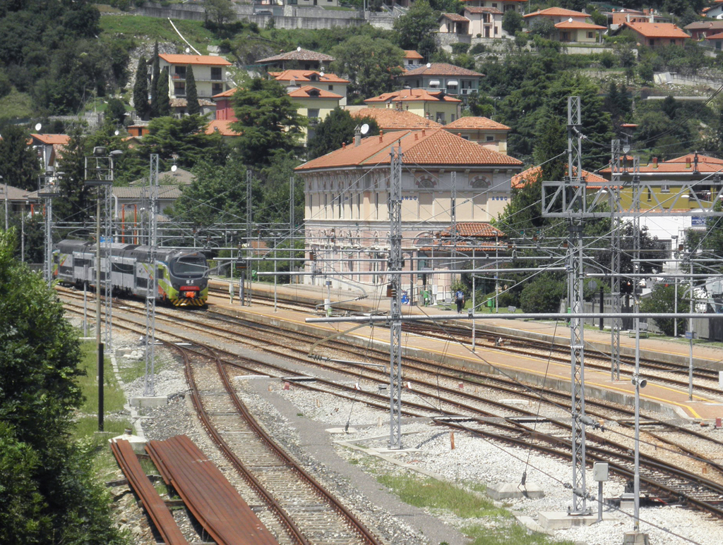 Stazione ferroviaria di Canzo-Asso